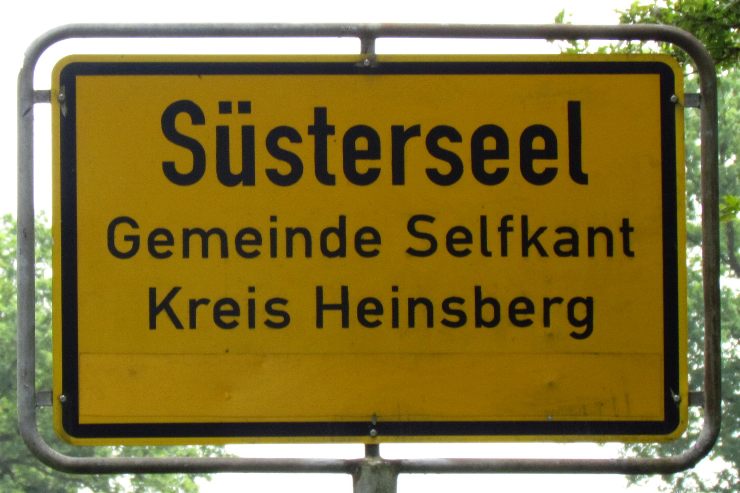 Ortstafel Süstersee. Zeichen aus der Zeit zwischen 1982 und 1992.